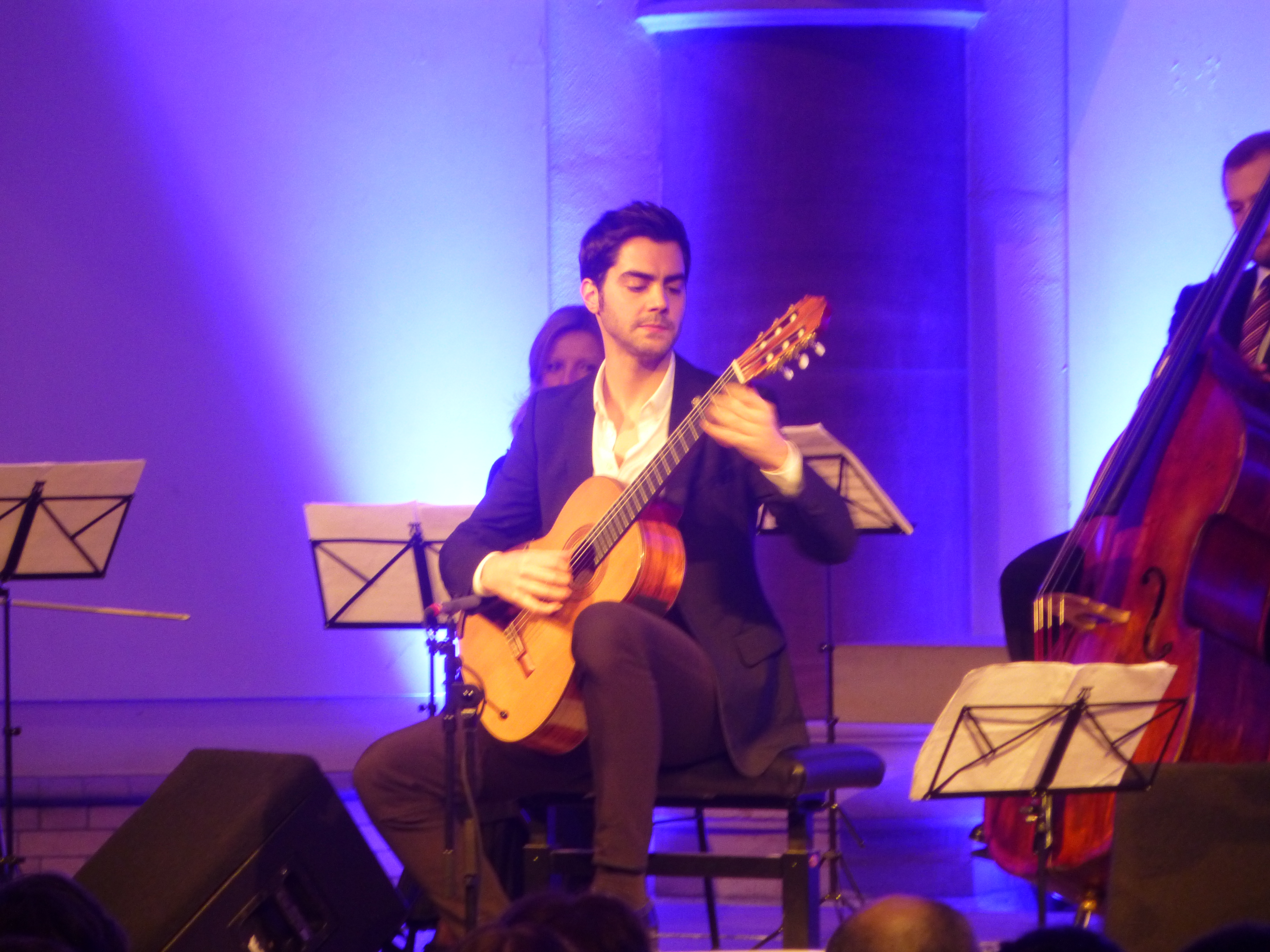 Miloš Karadaglić in concert, Hamburg (Germany), January 12, 2013